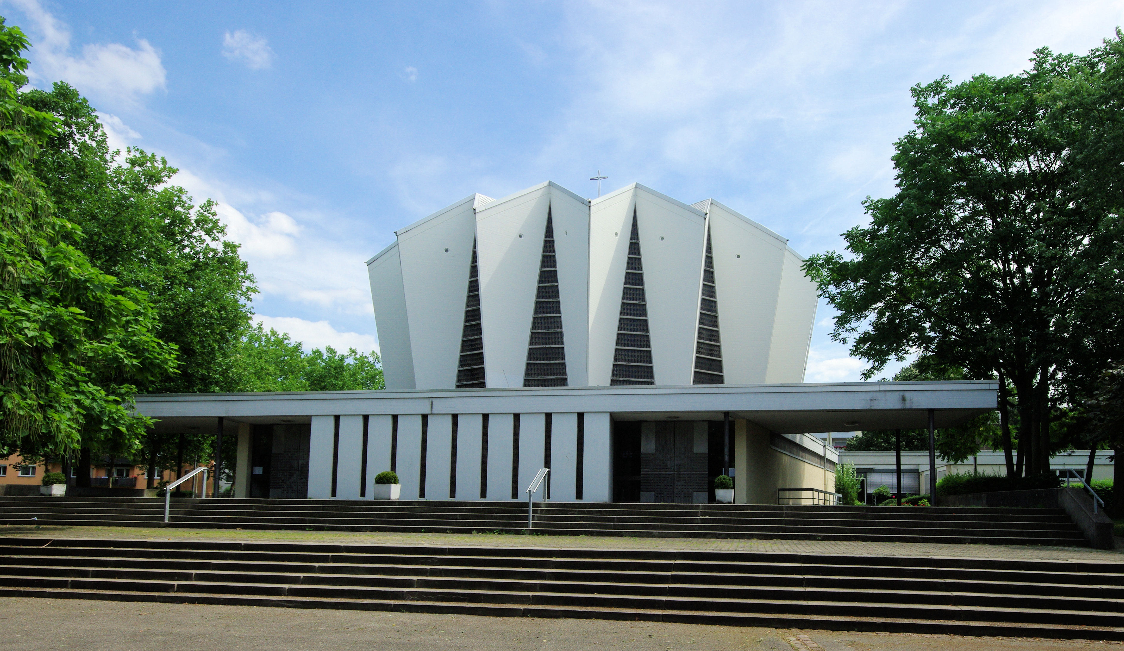 St._Albert